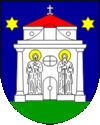 Đakovo_(grb).gif: Герб хорватського міста Джаково